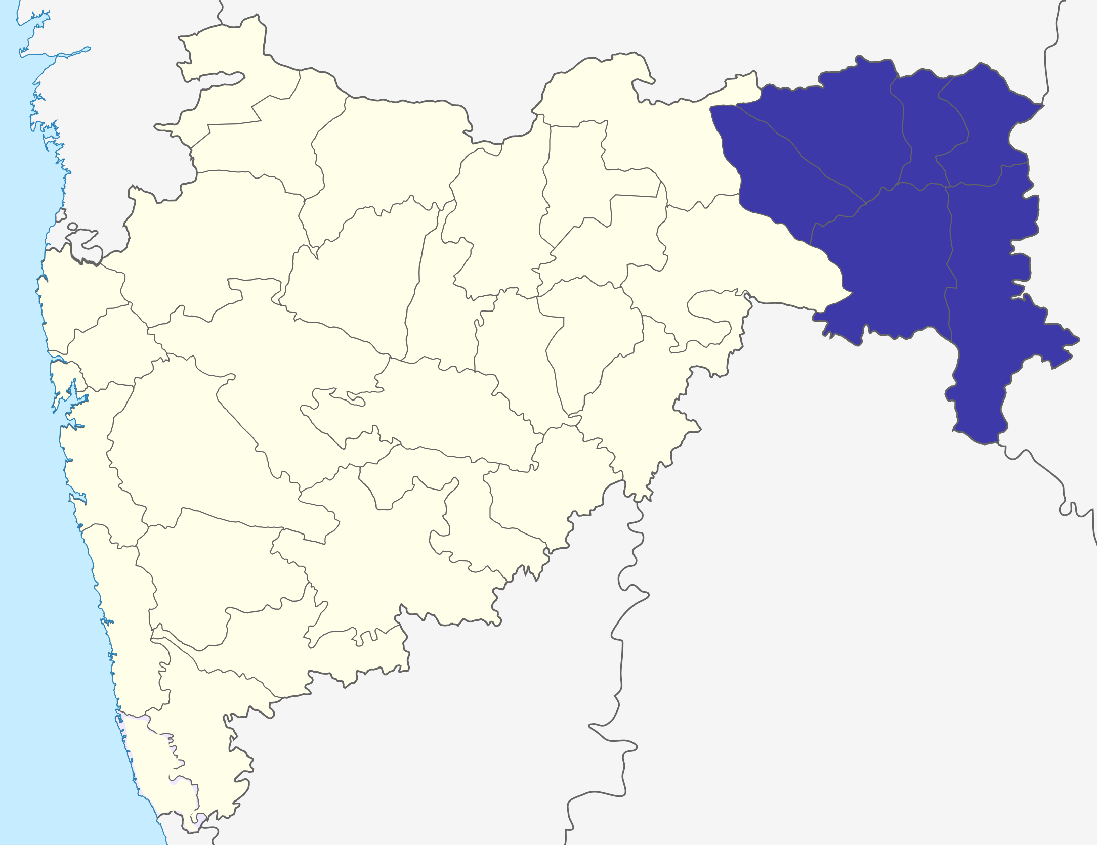 Nagpur division in Maharashtra, India